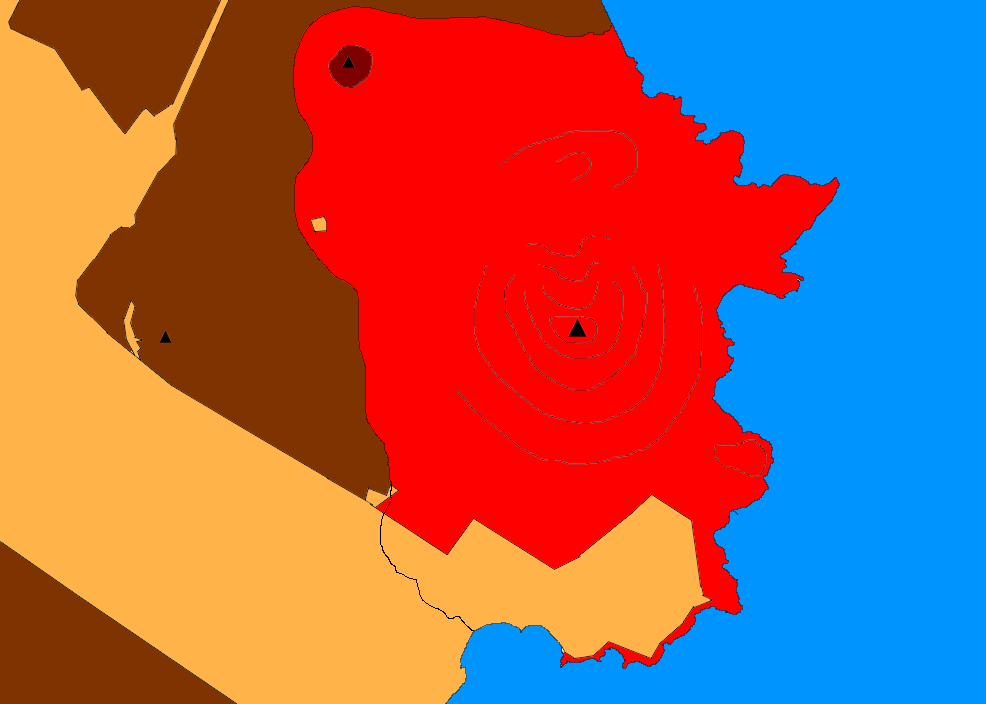 basic geografic map of the zone